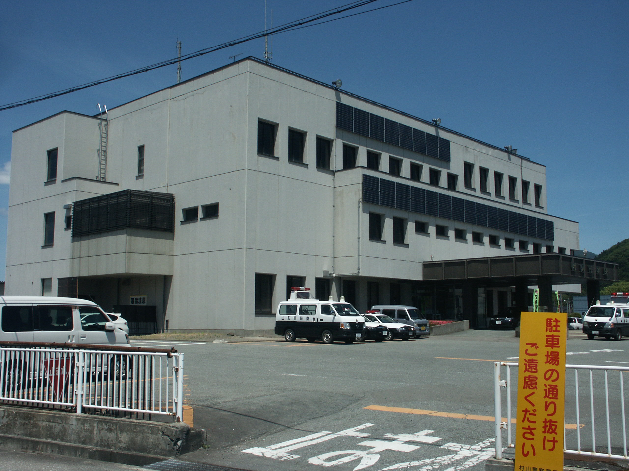 山形県村山警察署庁舎